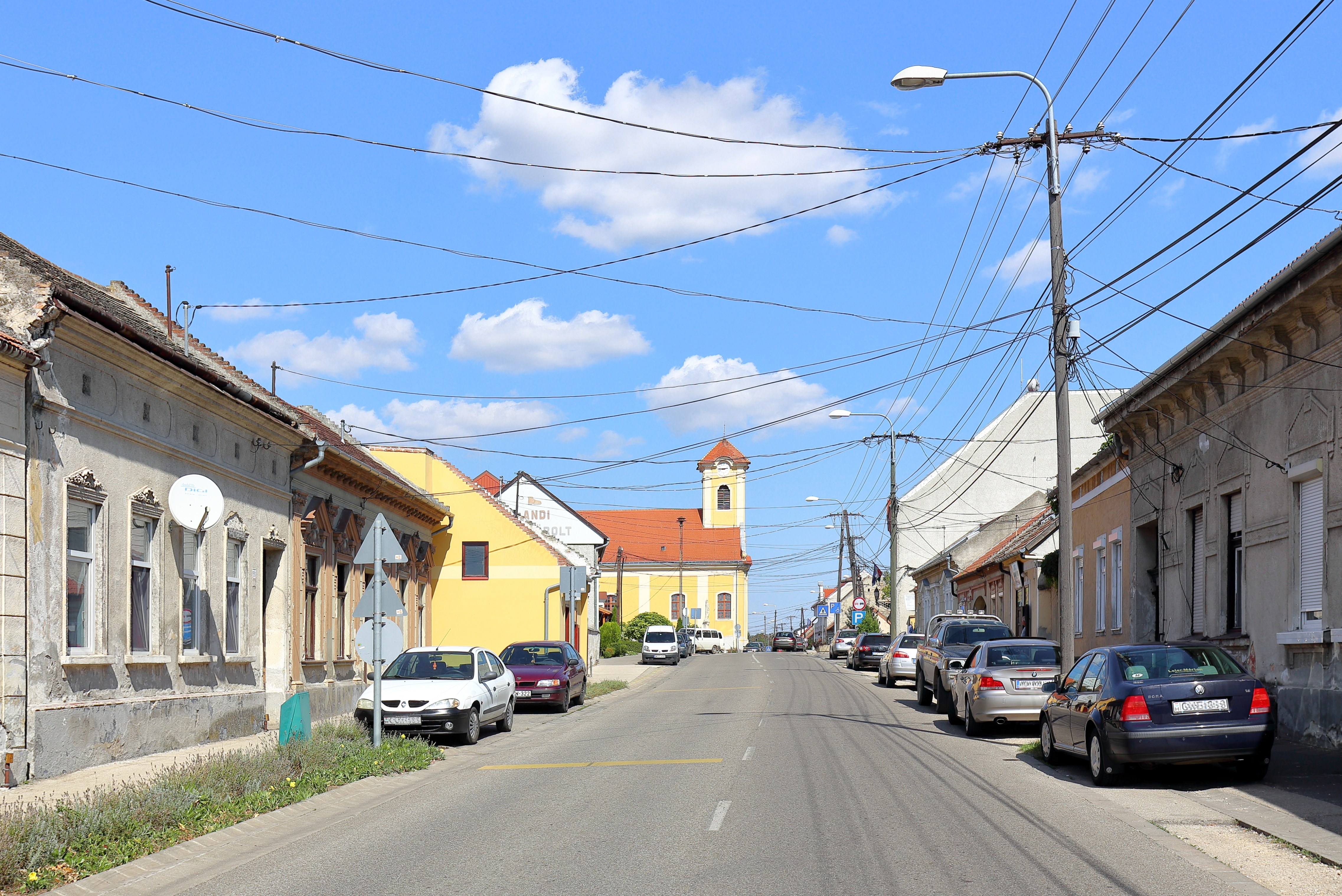 Blick von der Szabadság Utca Richtung Ost in der westungarischen Kleinstadt Jánossomorja. In der Bildmitte die katholische Kirche St. Johannes, die die Erzherzogin Maria Christine Habsburg und ihr Gatte Albert-Casimir Kurfürst von Sachsen-Teschen im Jahr 1769 erbauen ließen.